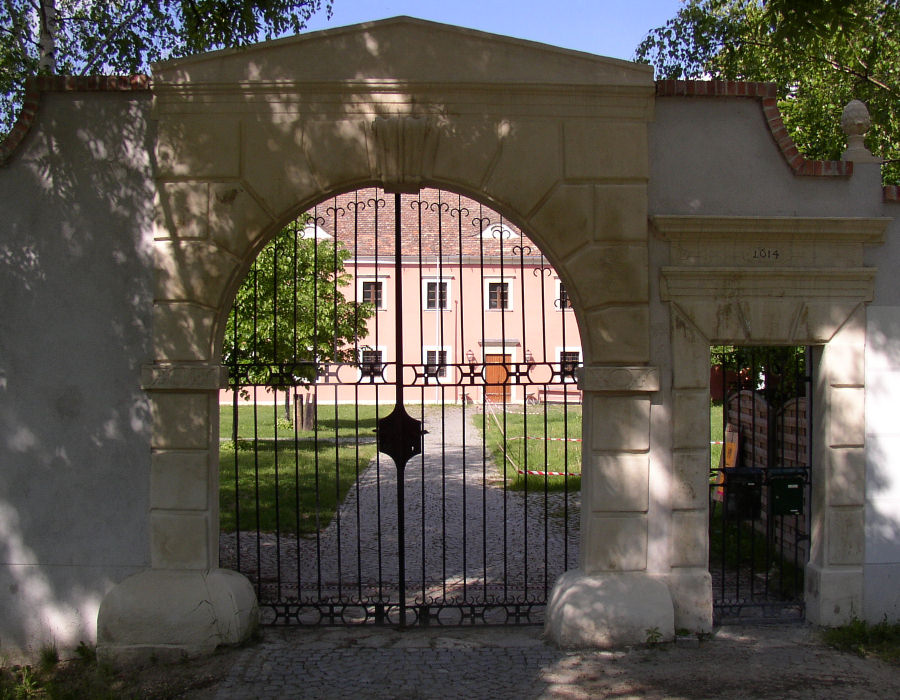 Summary Beschreibung: Hollabrunn in Niederösterreich, Museum Alte Hofmühle Fotograf: Herwig Reidlinger Datum: Mai 2003